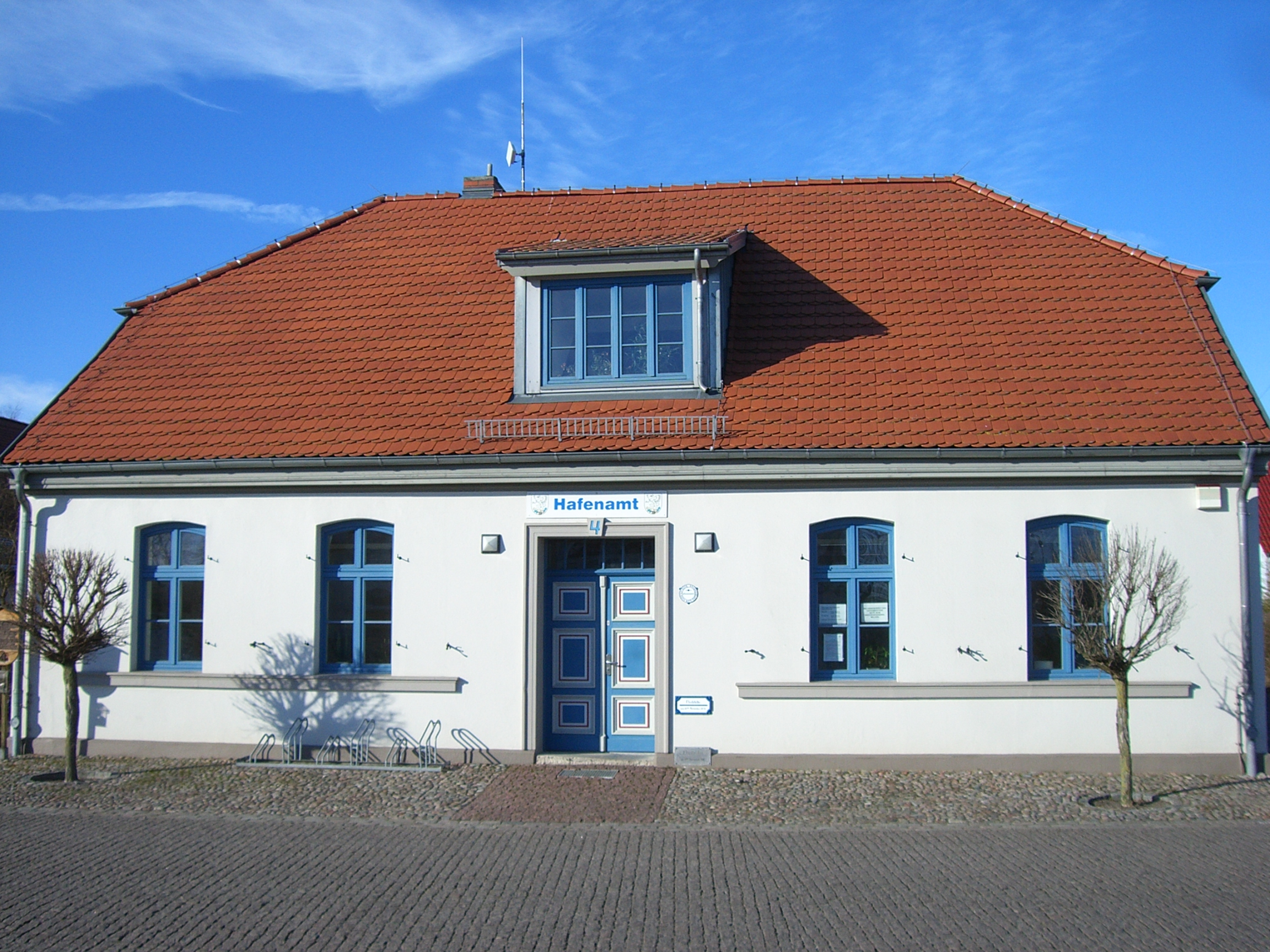 Hafenamt in Greifswald-Wieck